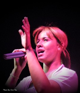 Chimène Badi en Nov 2010 à Perpignan